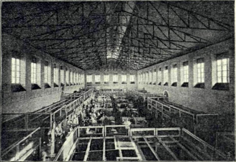 М. М. Сакалоў. Унутраны выгляд базару ў Растове-на-Доне